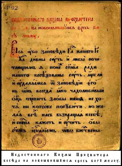 Беседа на јерес, Sermon against heresy